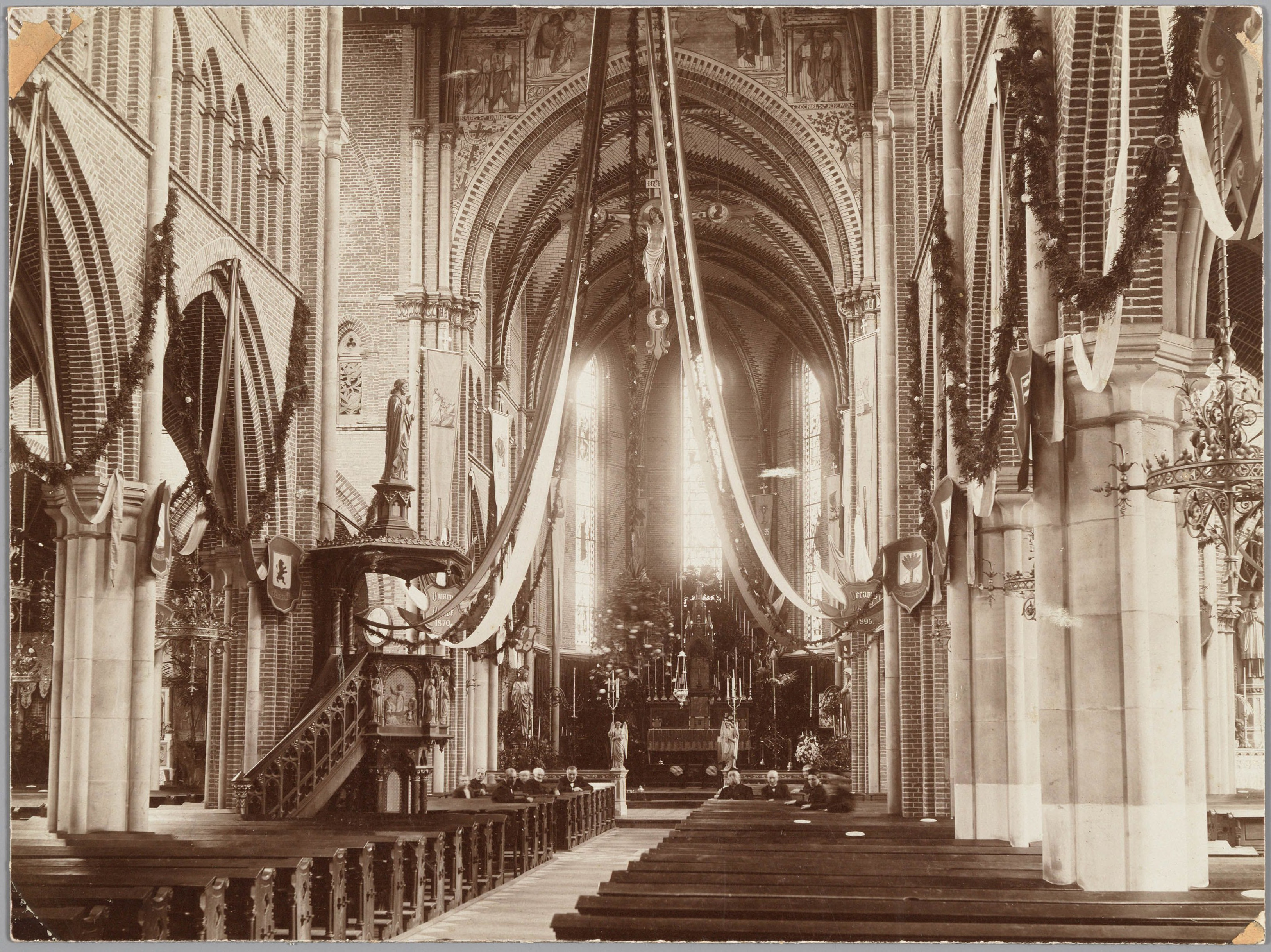 Interieur van de RK St. Laurentiuskerk bij het 25-jarig jubileum van J.H. Ruscheblatt. Op de foto zien we rechts deken Ruscheblatt met bonnet en links en rechts in de banken de kerkmeesters en hun familieleden. Het is de oudste foto van het interieur van de kerk waarop de oorsponkelijke schildering van Alex Kläsener in de triomfboog is te zien. In de twee hoeken staan de vier profeten Jesaia, Daniël, Ezechiël en Jeremia. Links een kruis met banderol met de tekst ‘Inimicitias ponam inter te et mulierem’ (genesis 3). In het midden een altaar met daarop Alpha en Omega en het Chi Rho teken.